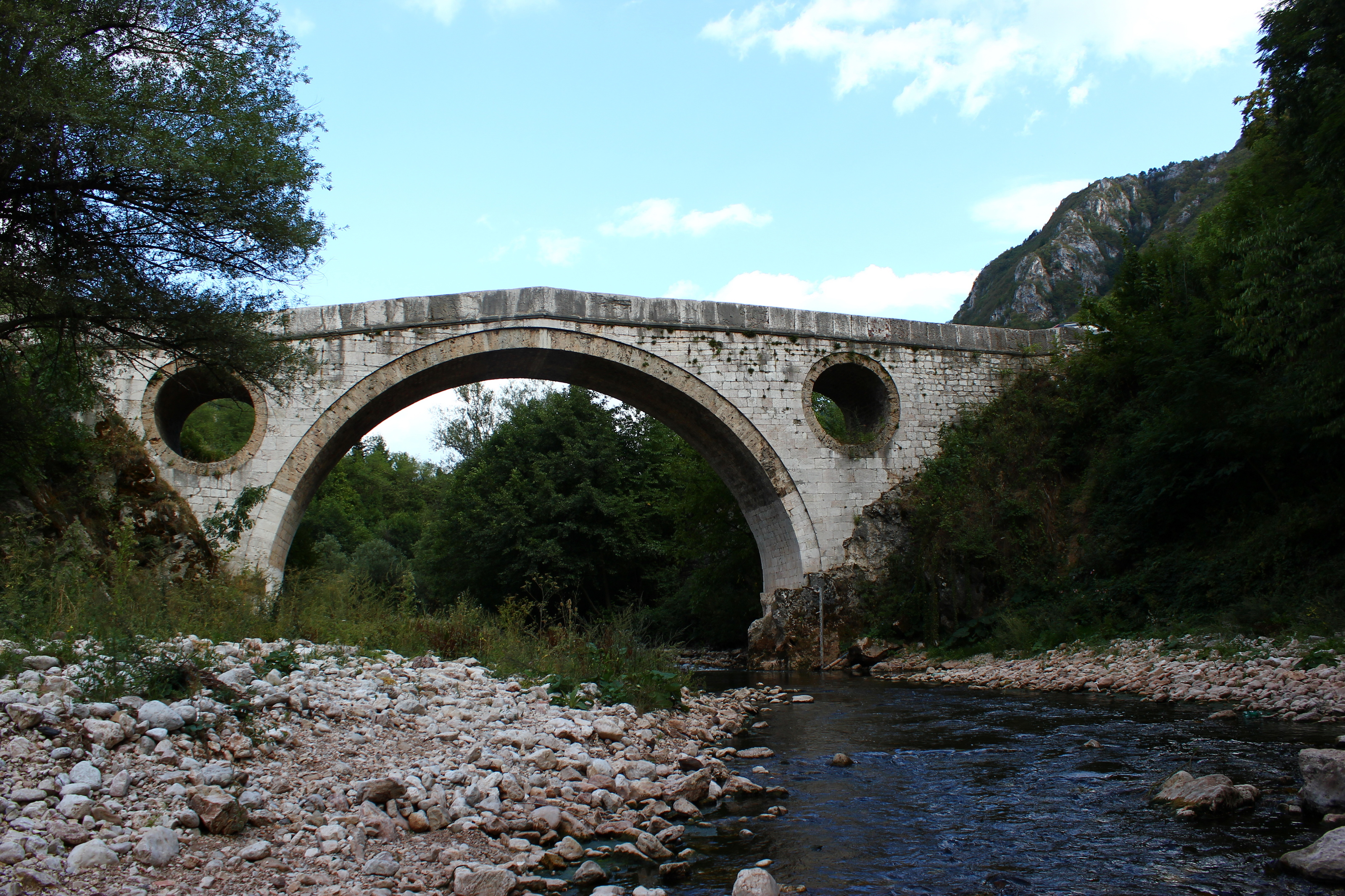 Die "Ziegenbrücke" (Kozija ćuprija) über die Miljacka etwas oberhalb von Sarajevo.